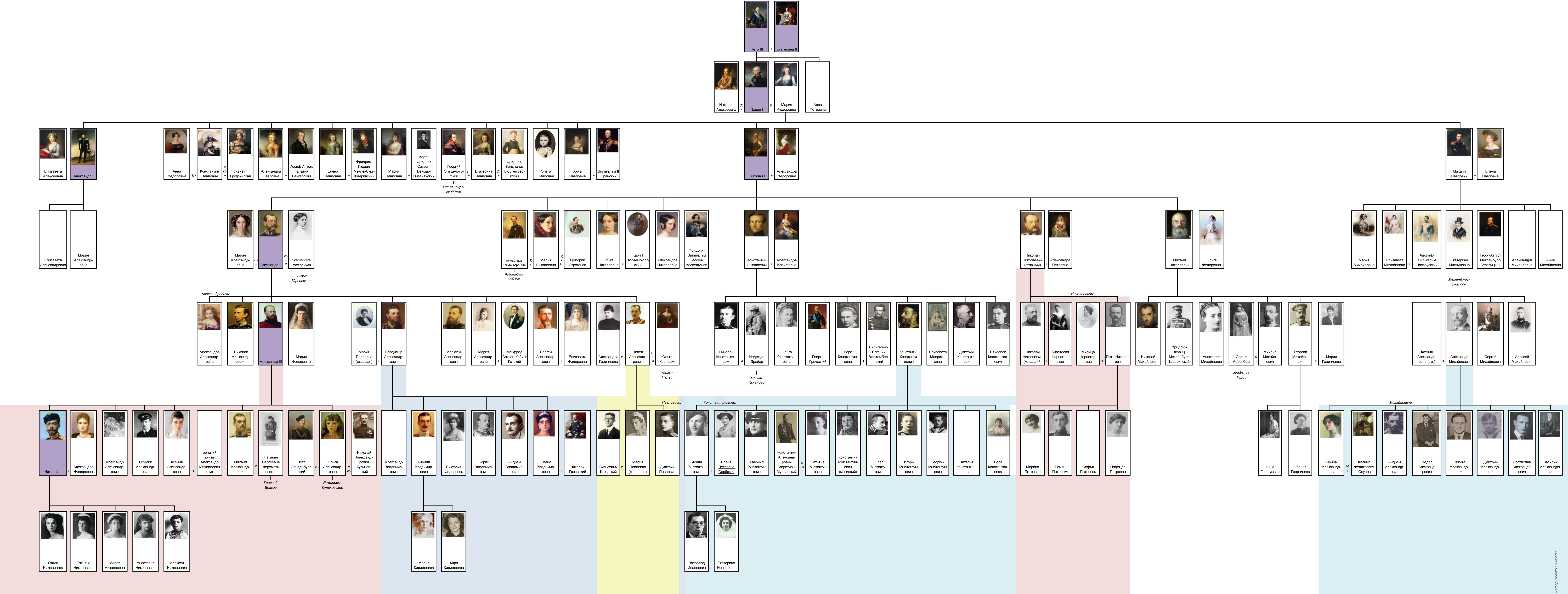 Генеалогическое древо дома Романовых (с 1762 до 1917 года: династия Гольштейн-Готторп-Романовы, с восшествия на престол Петра III до отречения Николая II)